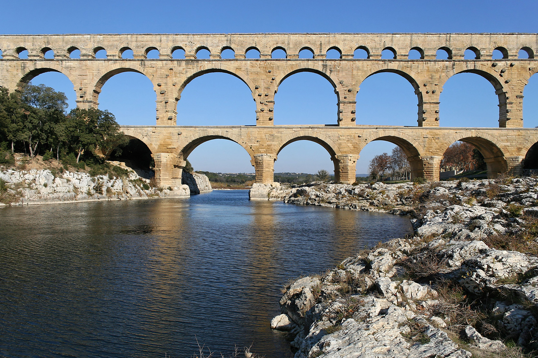 Remoulins - Francia